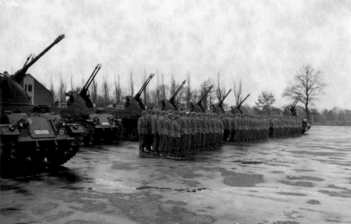 FlaBttr 30 ist vor ihren Flak-Panzern Typ M 42 angetreten